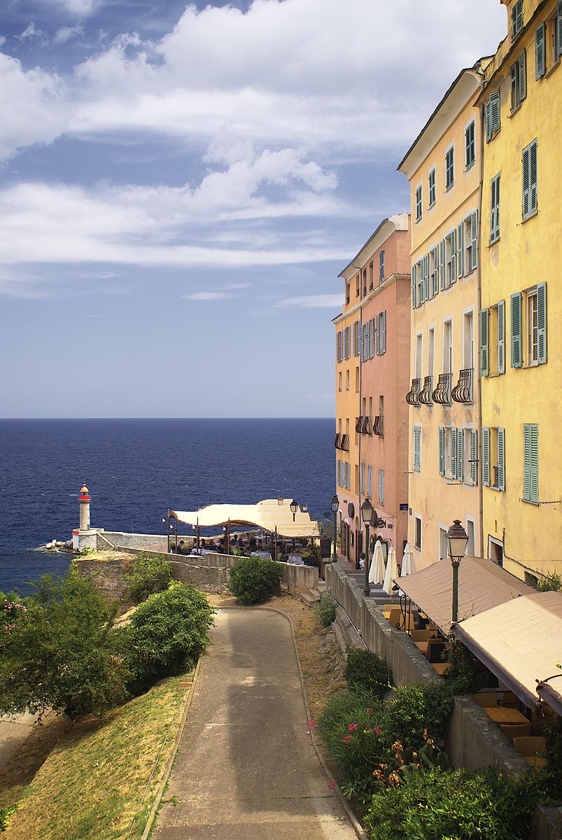 La citadelle de Bastia, vue depuis le parvis du Palais des Gouverneurs